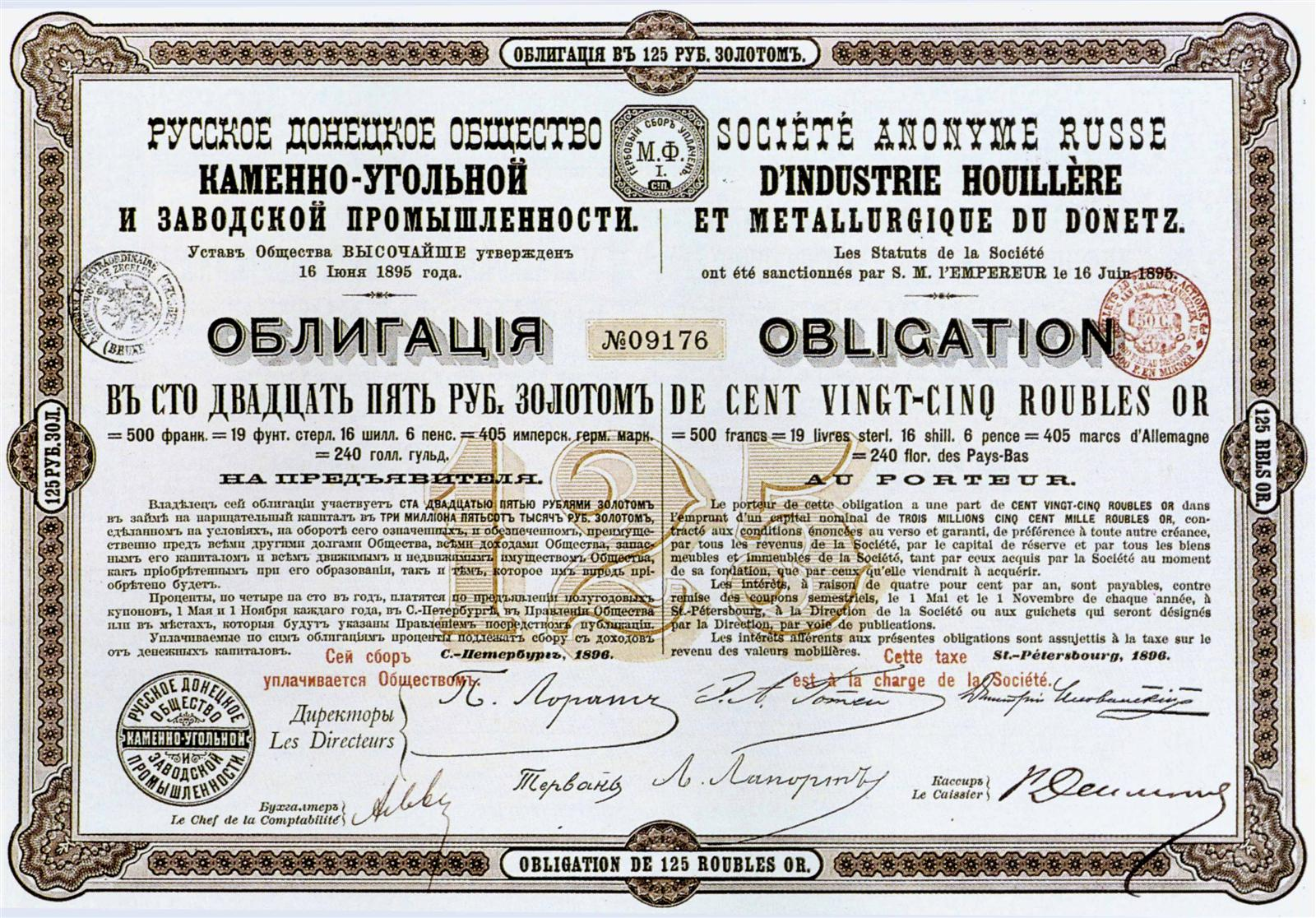 Русское донецкое общество каменноугольной и заводской промышленности. Облигация в 125 рублей золотом